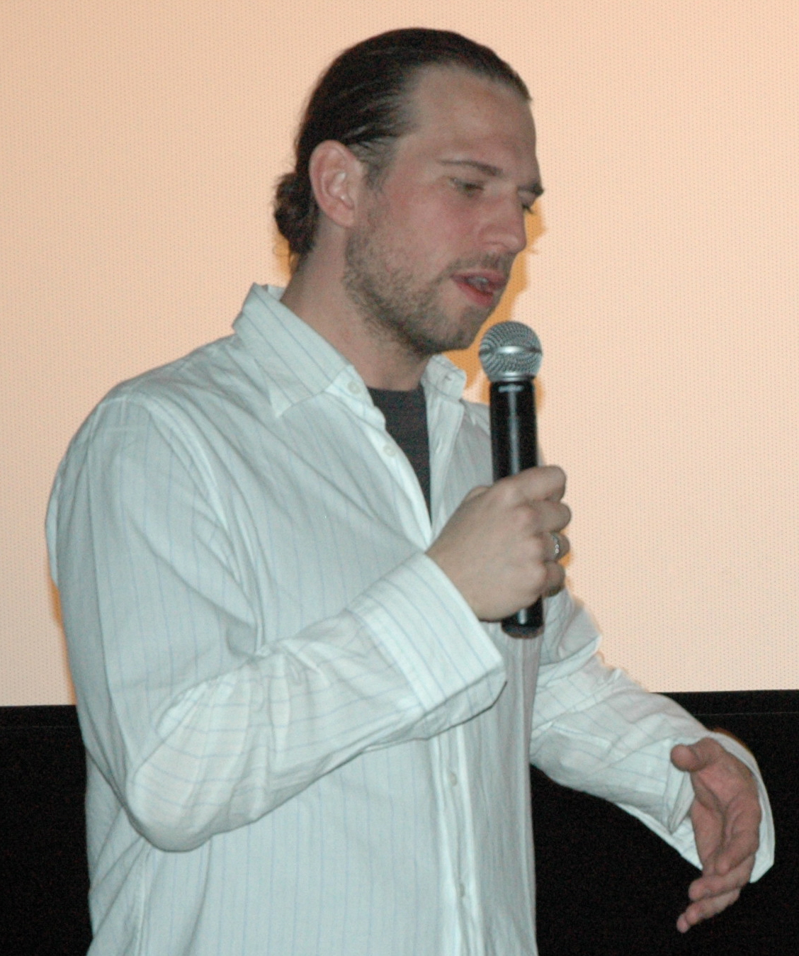 Der deutsche Filmregisseur Florian Gaag bei der Nachbesprechung seines Films "Wholetrain" am Filmfestival "Crossing Europe 2007" im Linzer "Moviemento"-Kino